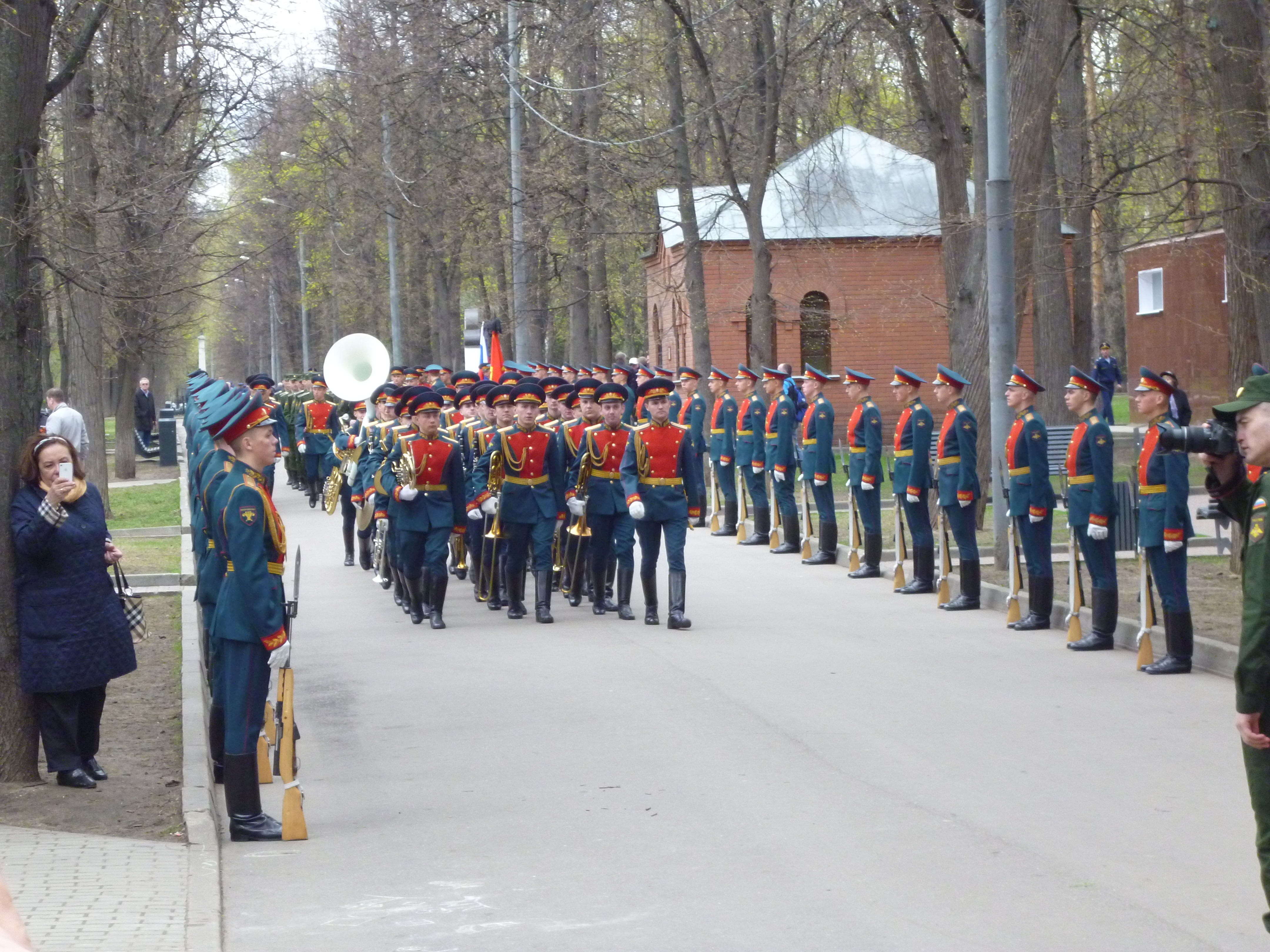 Церемония перезахоронения останков великого князя Николая Николаевича Младшего и его супруги великой княгини Анастасии Николаевны.